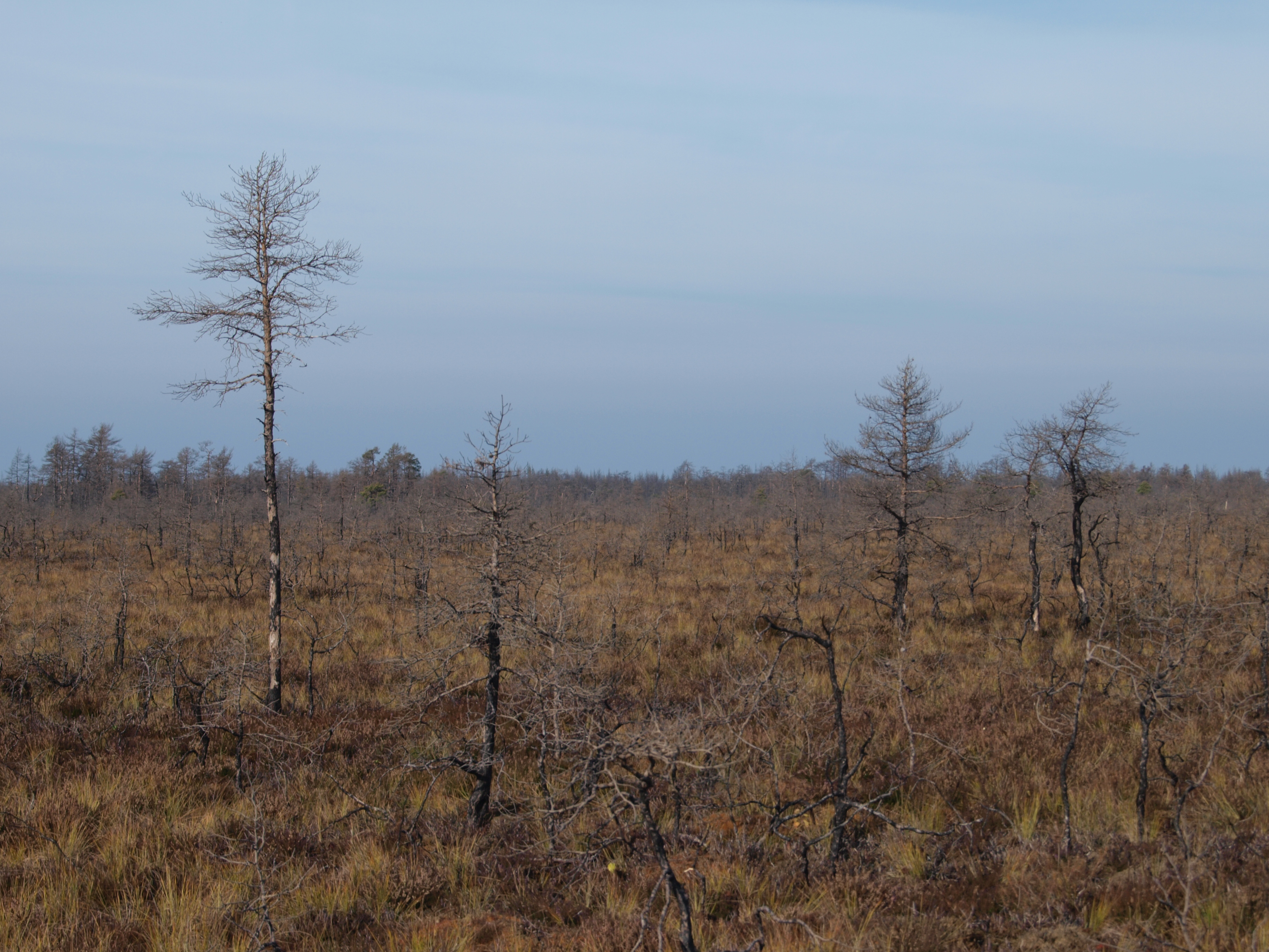 Põlenud rabamaastik Läänemaa Suursoos Tänavjärve läänekaldal Veskisoos.